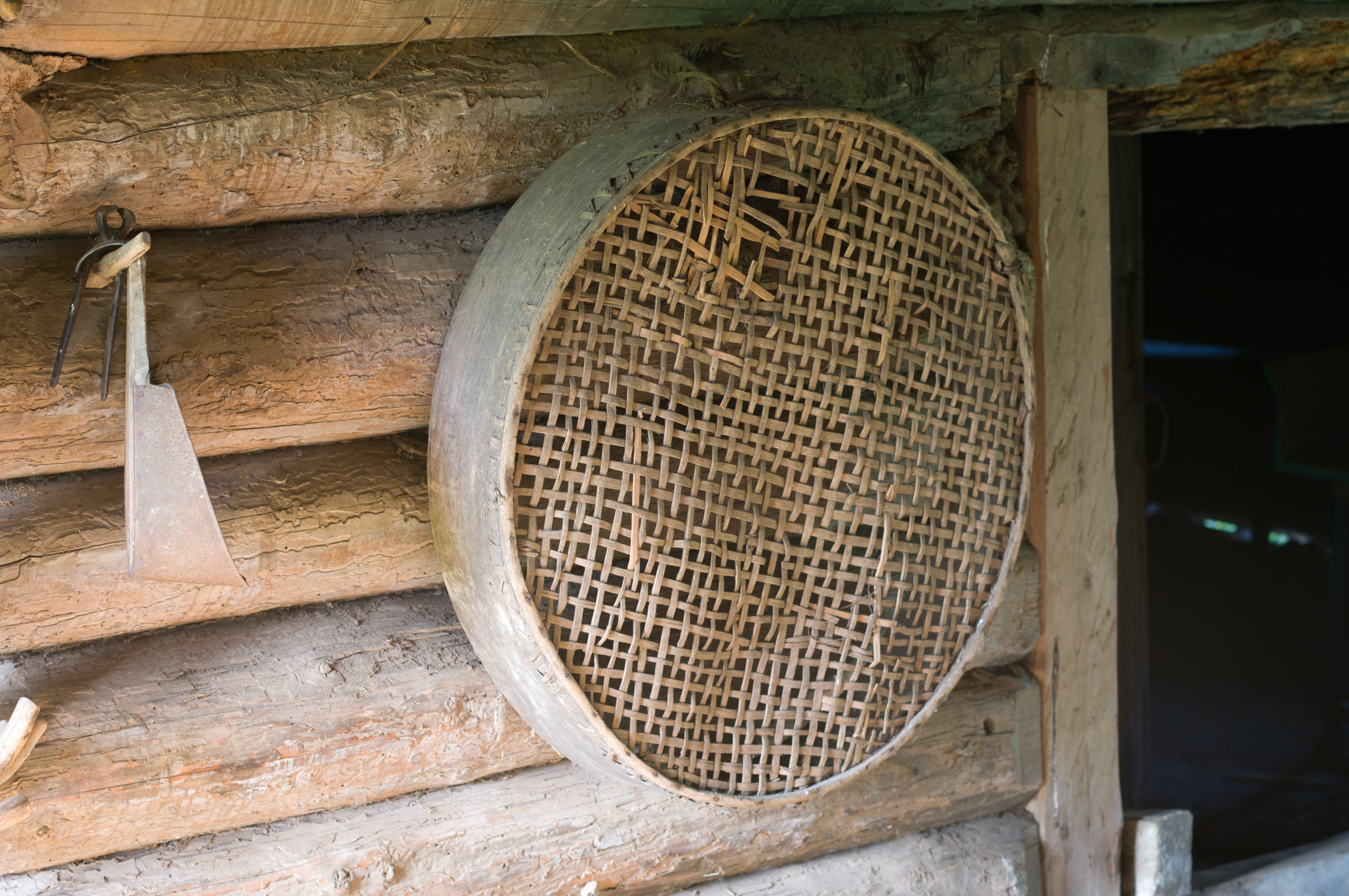 Sari Hinni talus